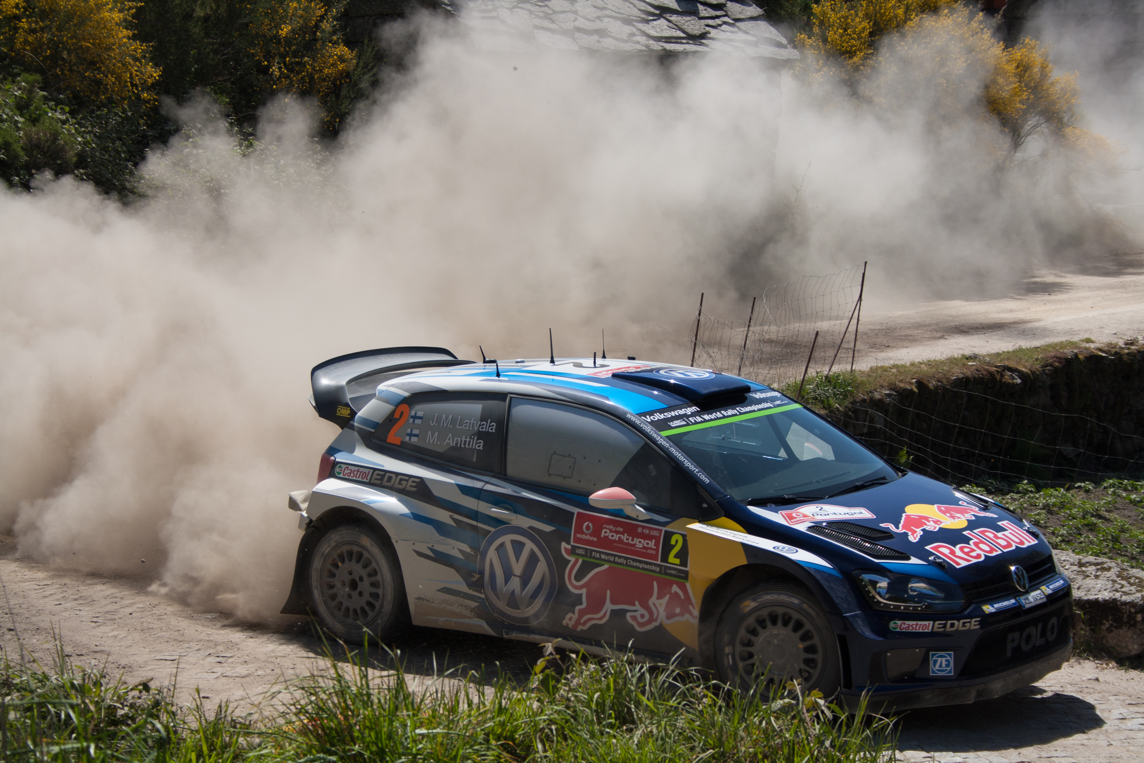 J.M. Latvala - M. Anttila